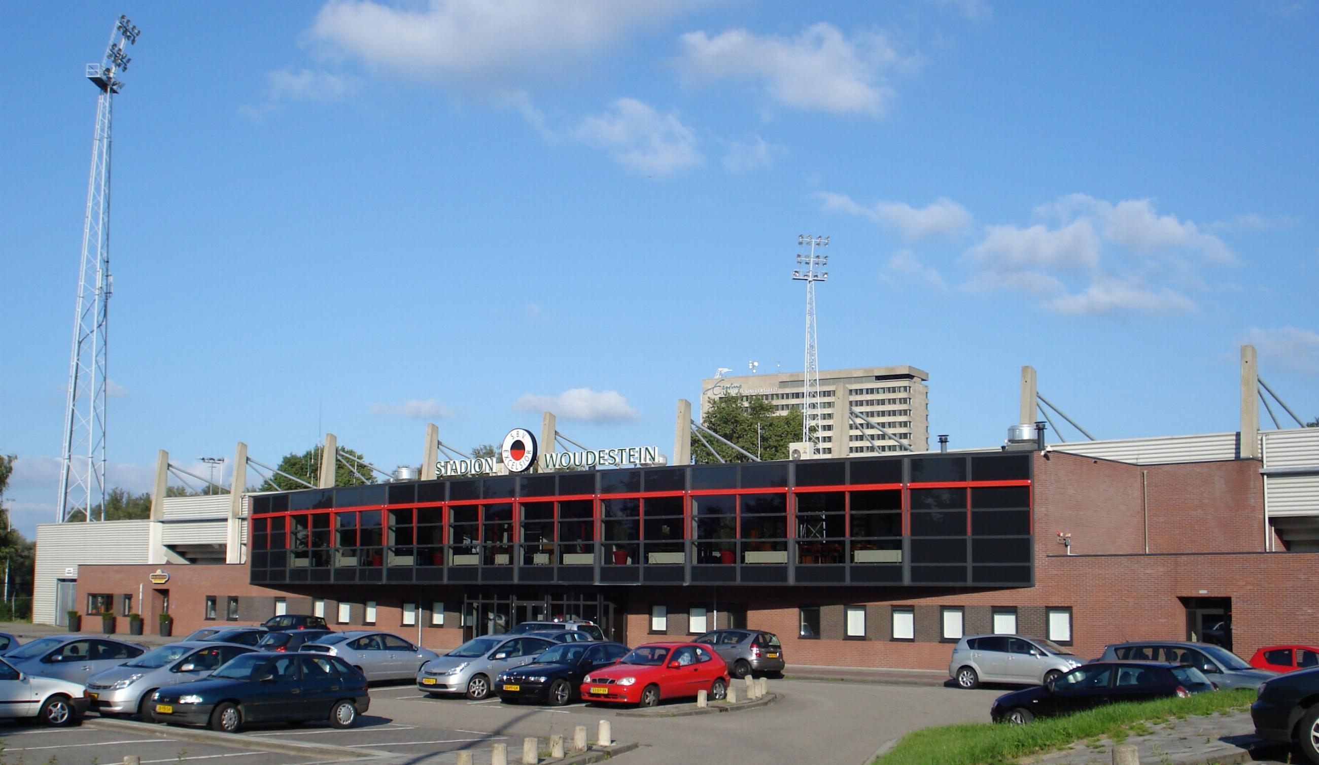 Rotterdam, Kralingen. Stadion Woudestein van voetbalclub Excelsior.